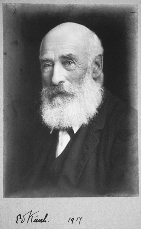 エドワード・キンチ The Royal Agricultural College Library所蔵